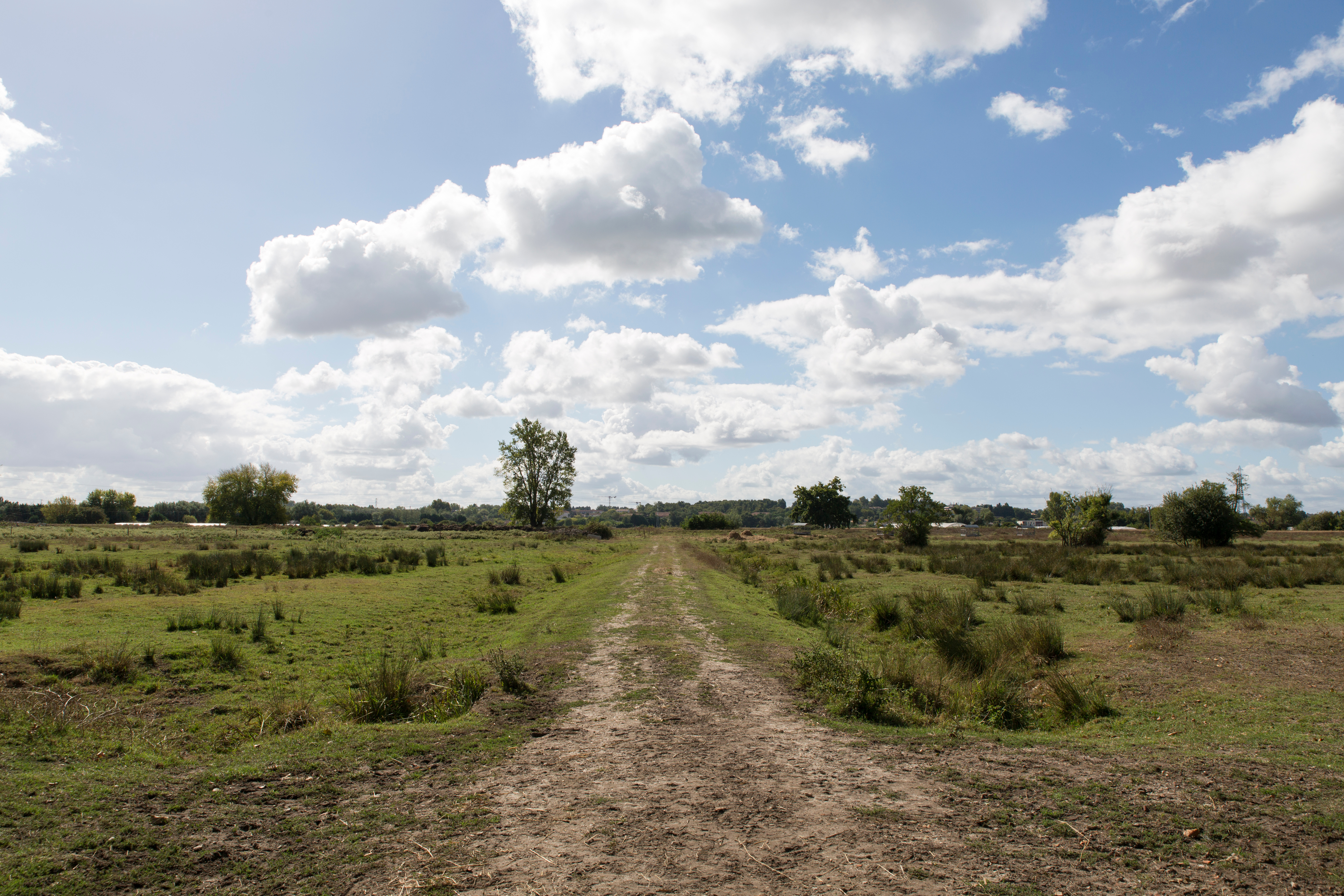 Lébade au sud de la forteresse de Blanquefort (33) ; vue en direction de la jalle puis de Bordeaux.